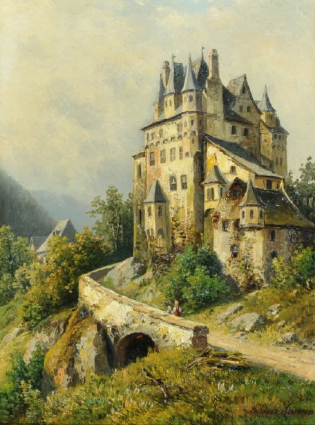 Schlossansicht in Berglandschaft, Öl/Holz, 32 x 23,5 cm